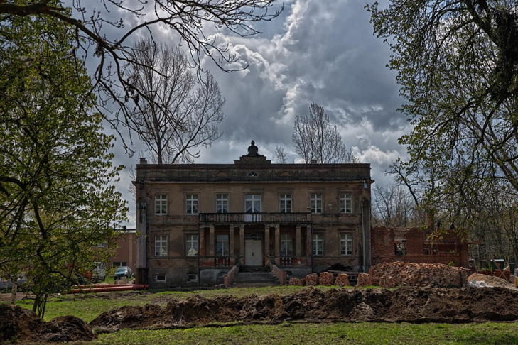 Połażejewo Dwór Kosińskich (w trakcie remontu)